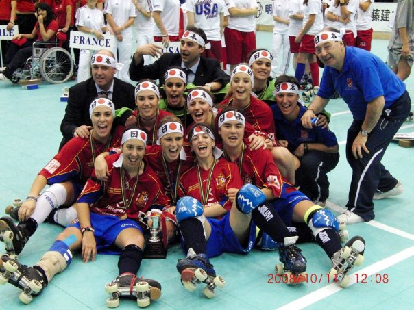 Mundial femenino Hockey Patines, Japón.